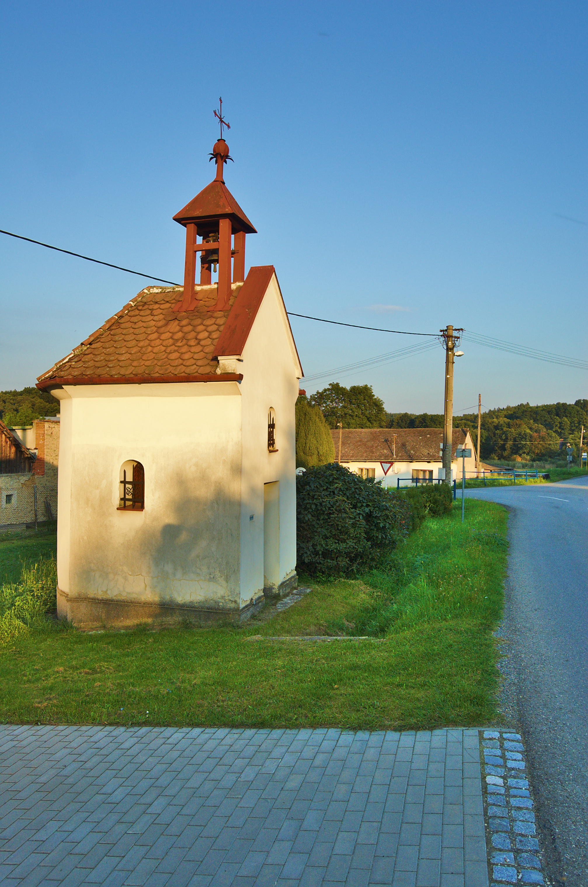 Kaple na křižovatce uprostřed obce, Kandia, Laškov, okres Prostějov